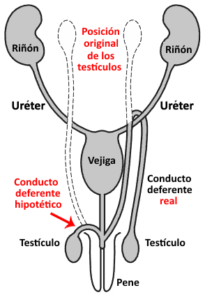 Traducción al español de la imagen original